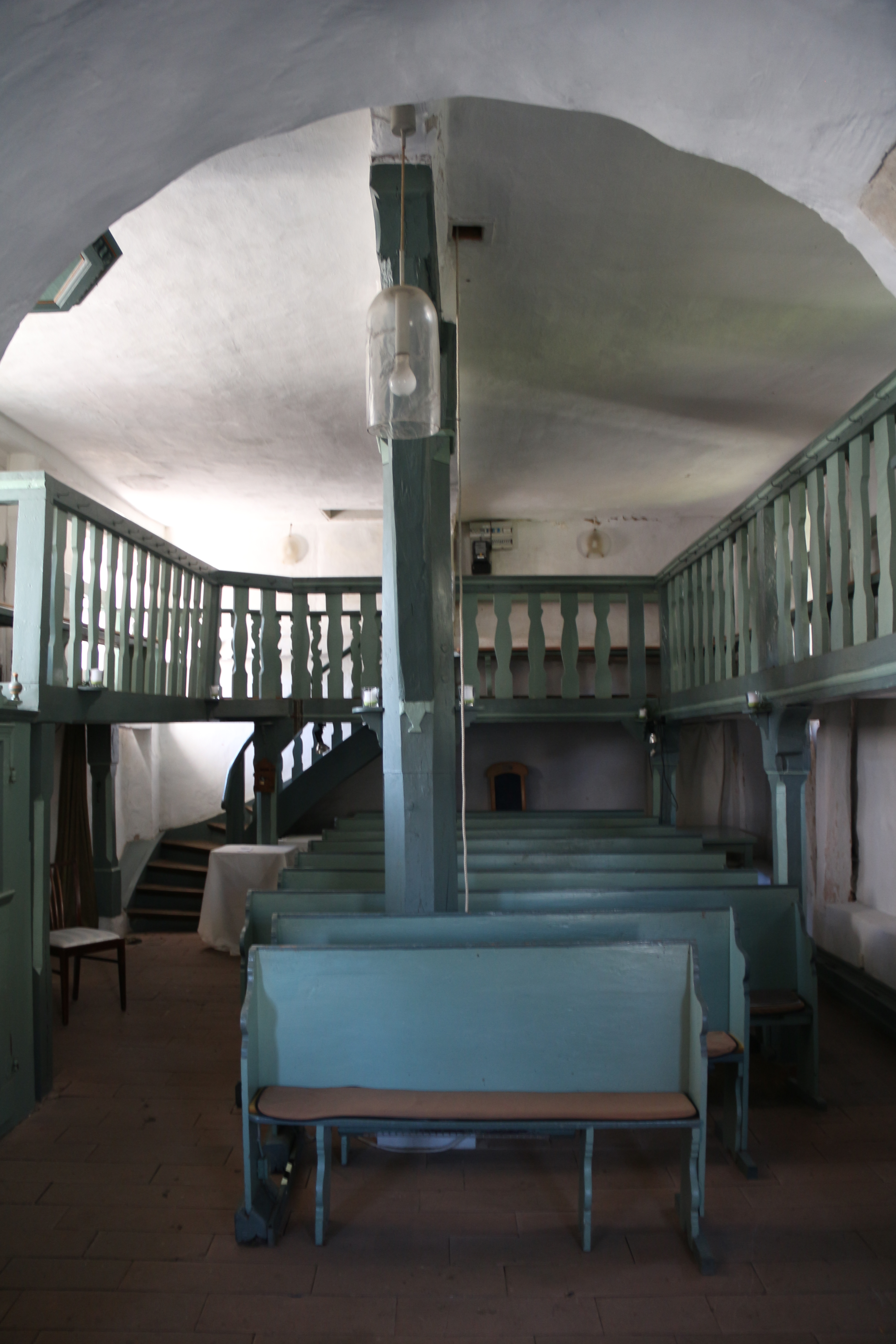 Hufeisenkirche Altenvers